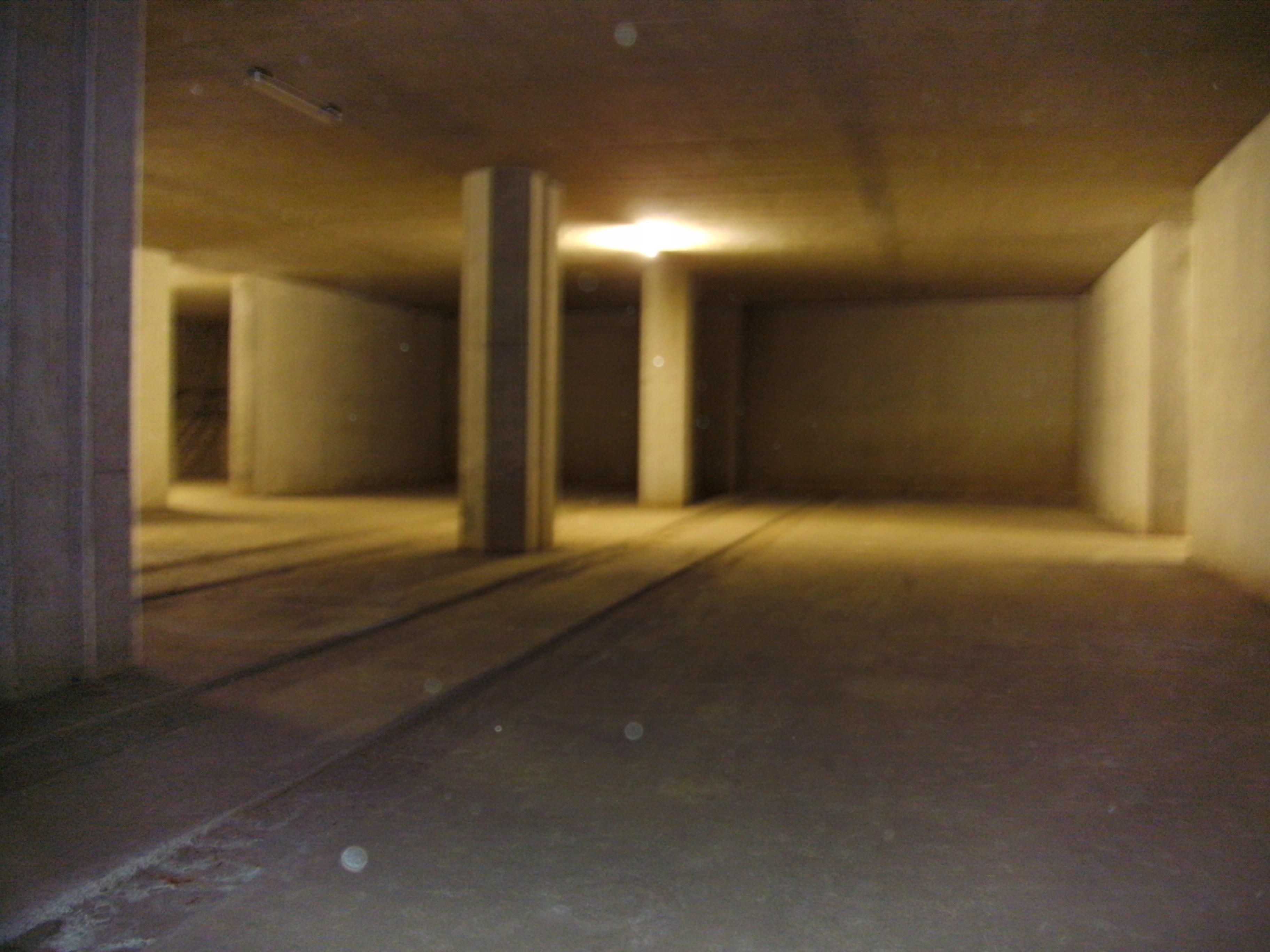 Bauvorleistung für die Linien 3 und 4 in Köln Deutz. Diese Halle befindet sich noch unter der bereits vorhandenen für die Linien 1 und 9.